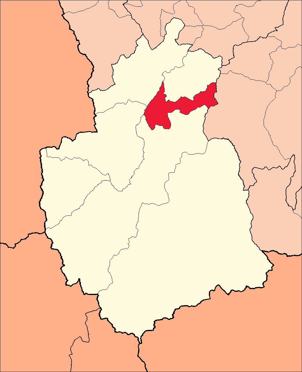 Área del distrito de Jivia dentro de la provincia de Lauricocha.